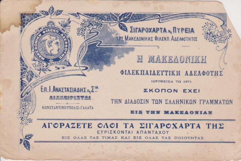 Μακεδονική_φιλεκπαιδευτική_αδελφότης